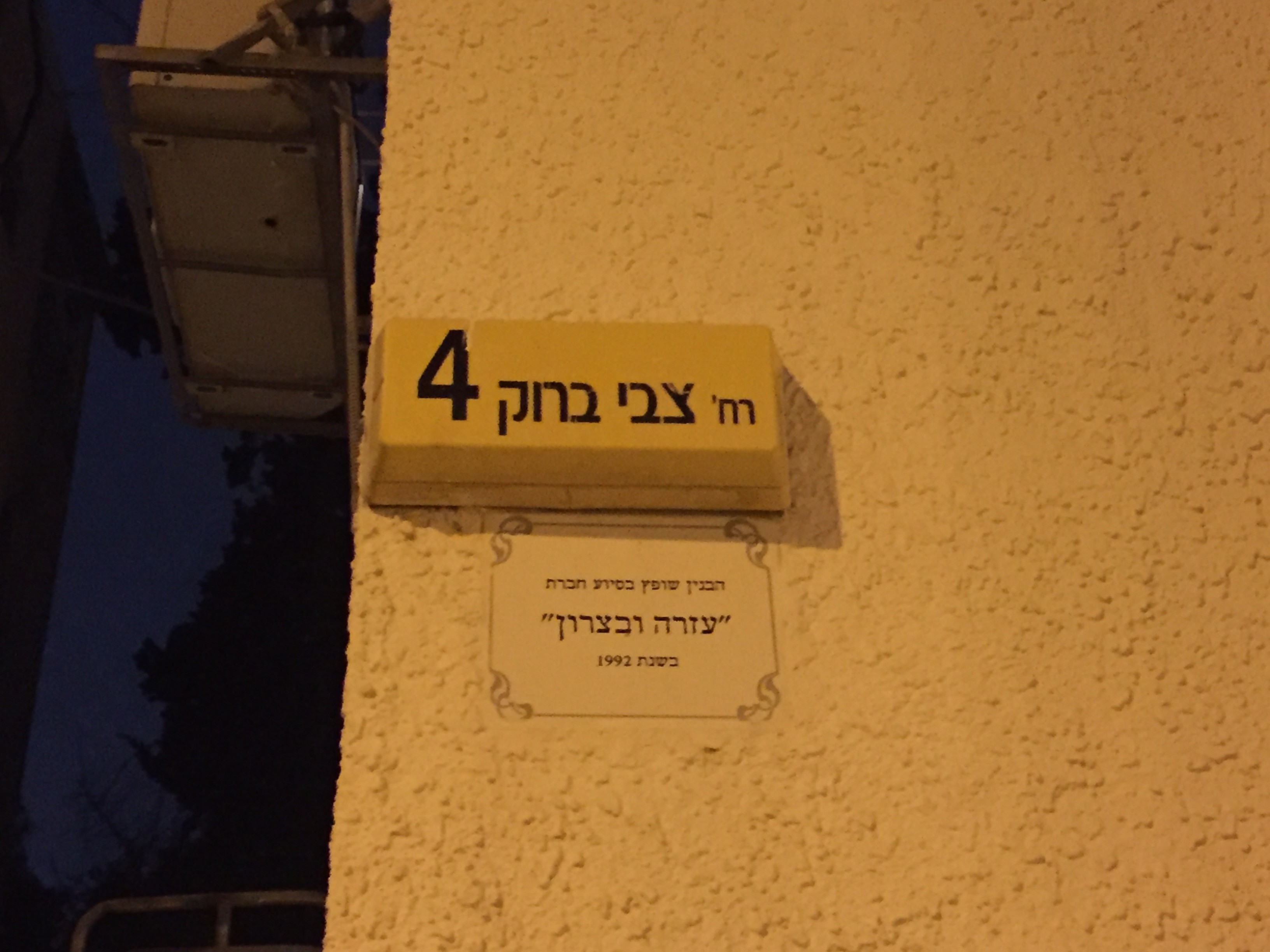 שלט רחוב עם שמו של צבי ברוק